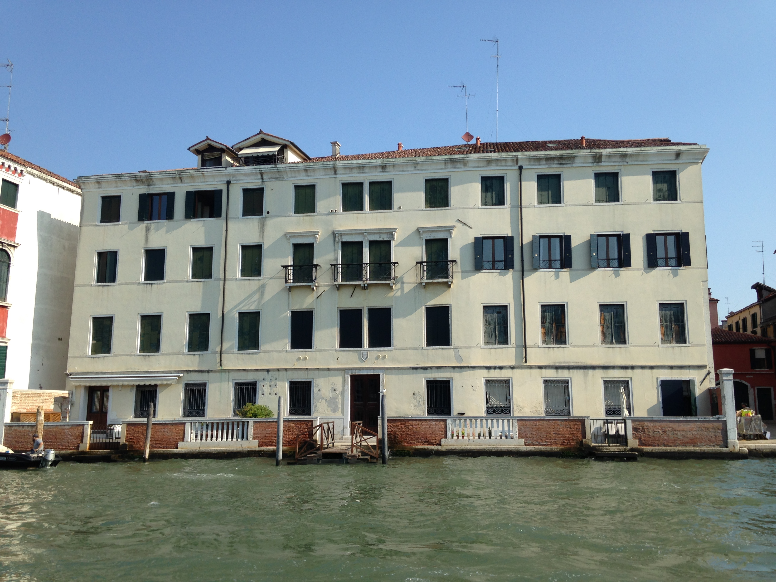 Cannaregio, 30100 Venice, Italy